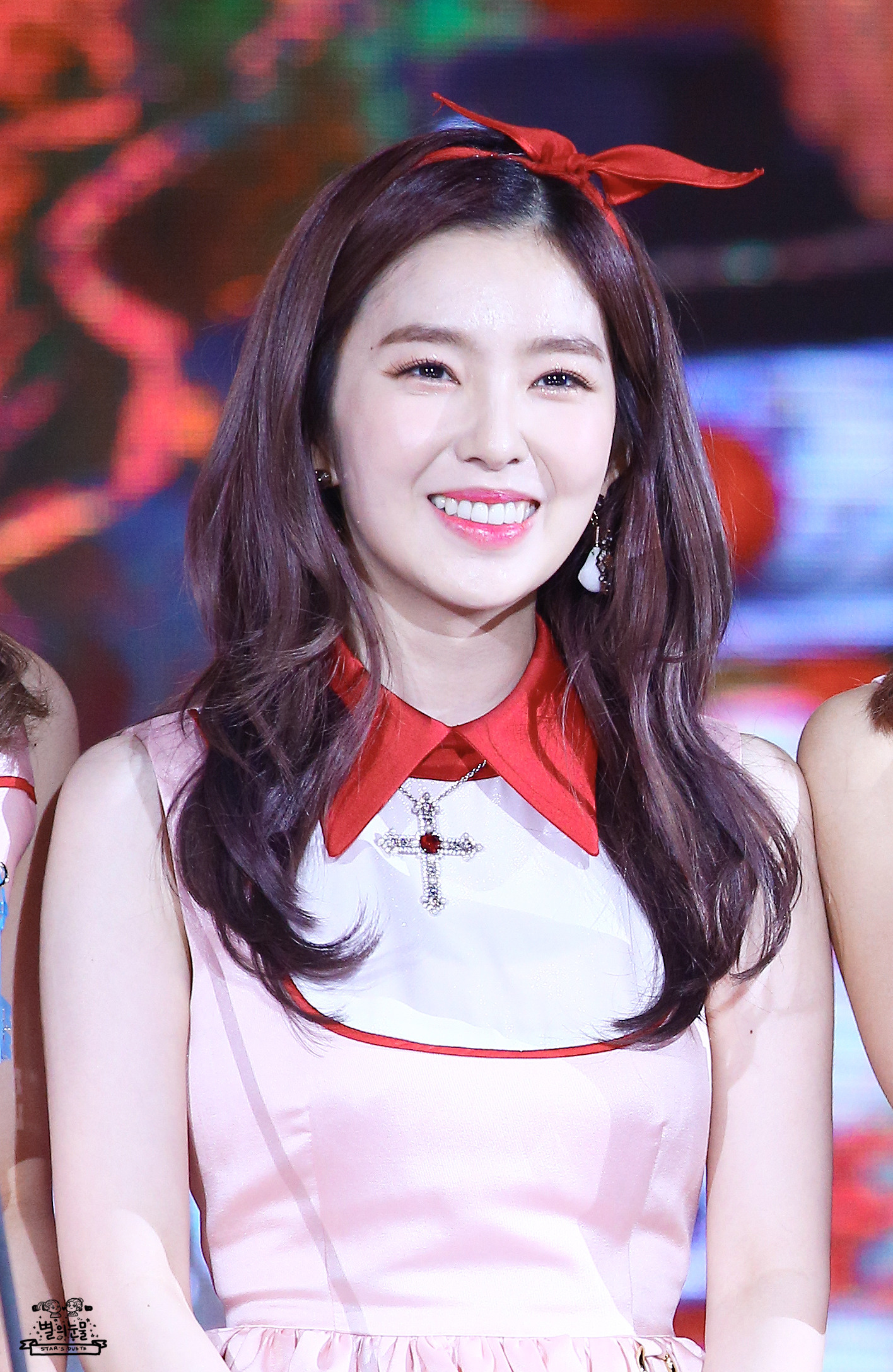 161119 멜론뮤직어워드 아이린